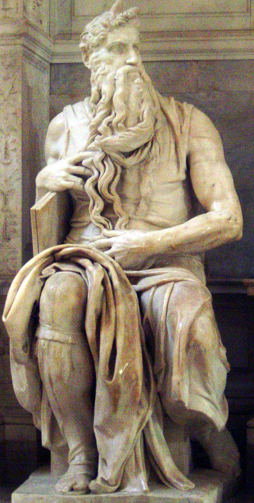 Moises de Miguel Ángel Roma, Italia